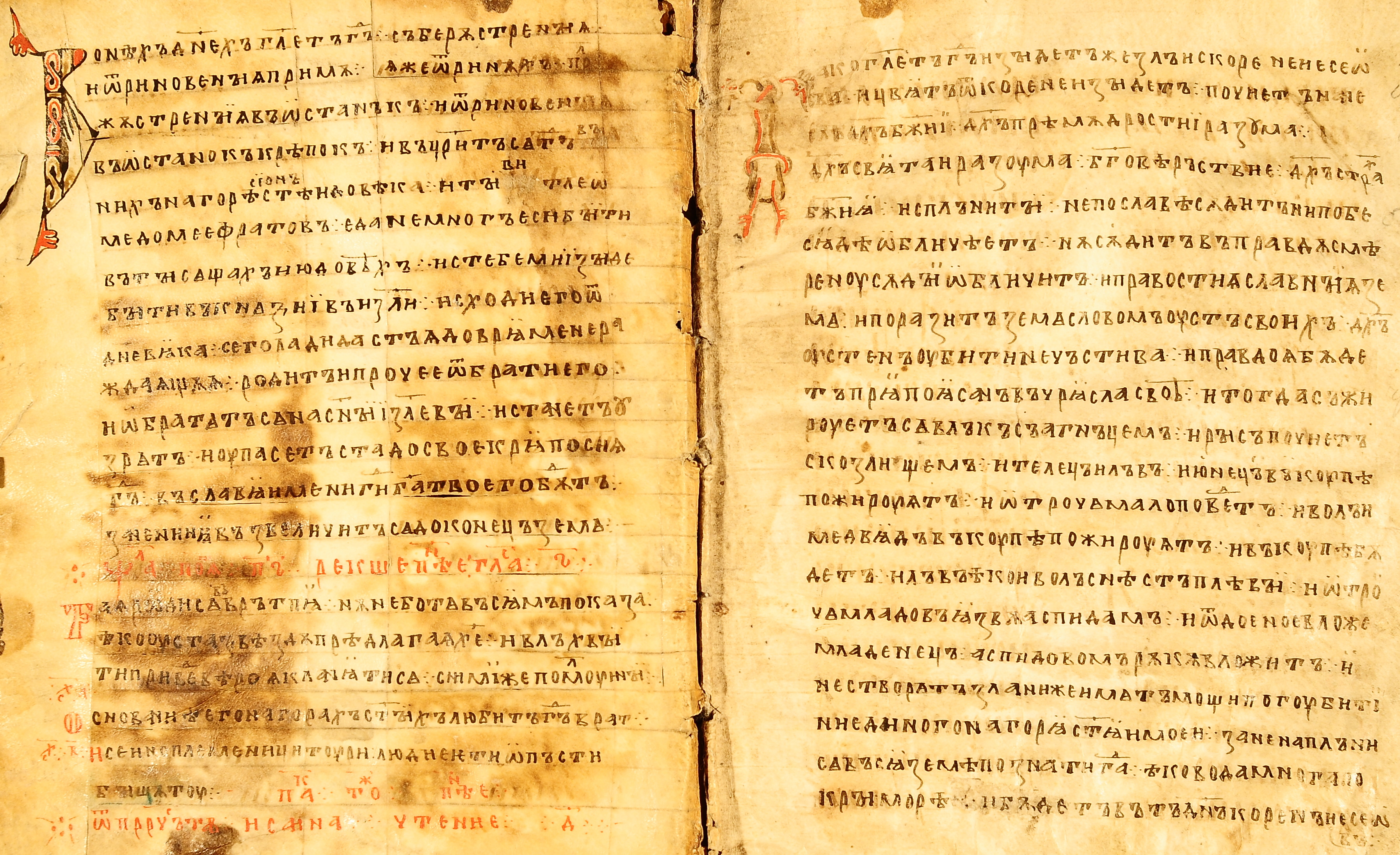 Григоровичев паримейник